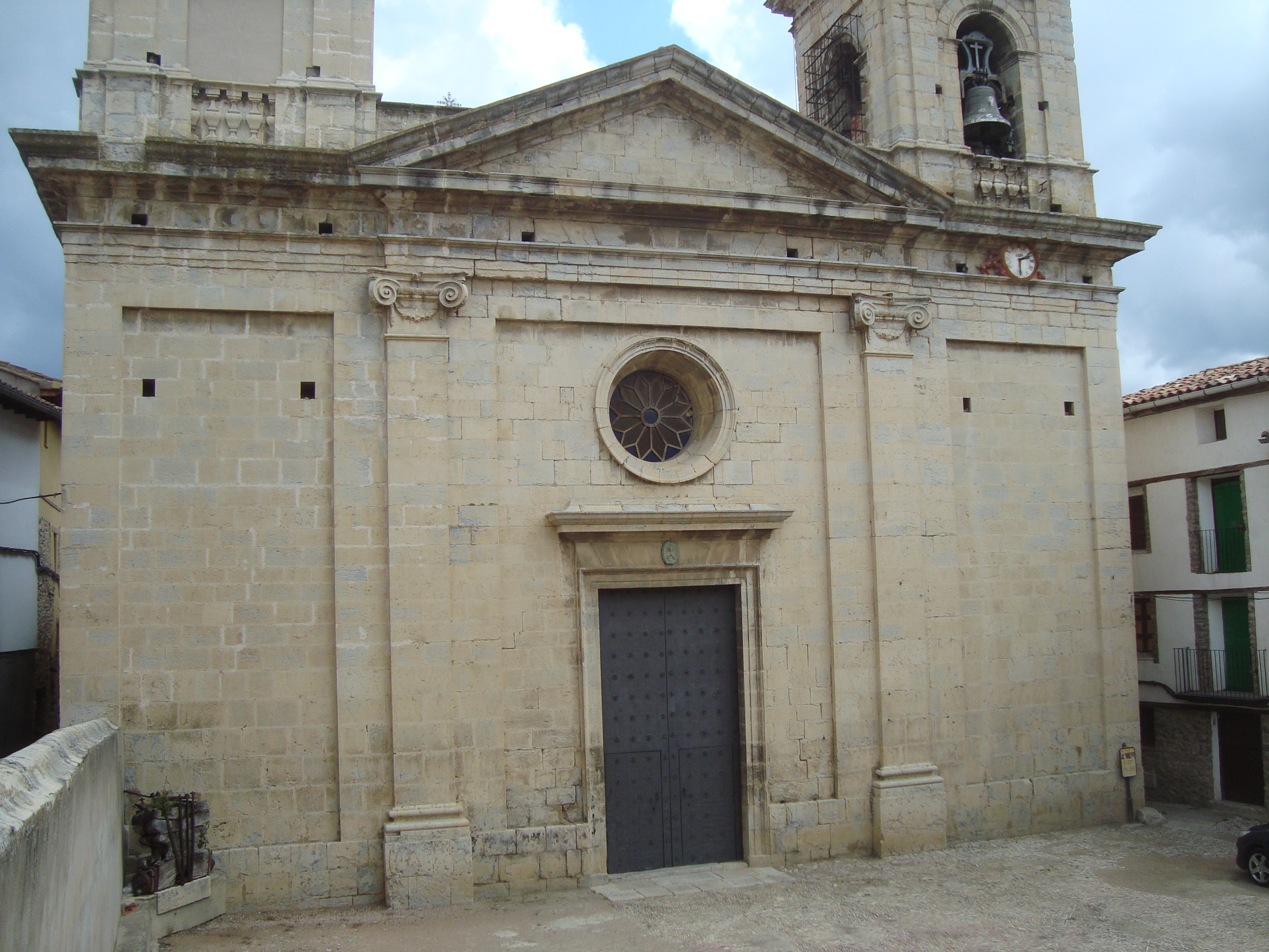 Església parroquial de l'Assumpció (Sorita) 01.141-005.